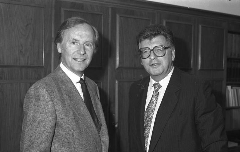 15.5.1987 Der Präsident des Deutschen Bundestages, Dr. Philipp Jenninger (rechts), empfängt den neuen Staatssekretär des Auswärtigen Amtes, Dr. Jürgen Sudhoff, zum Antrittsbesuch im Bundeshaus.